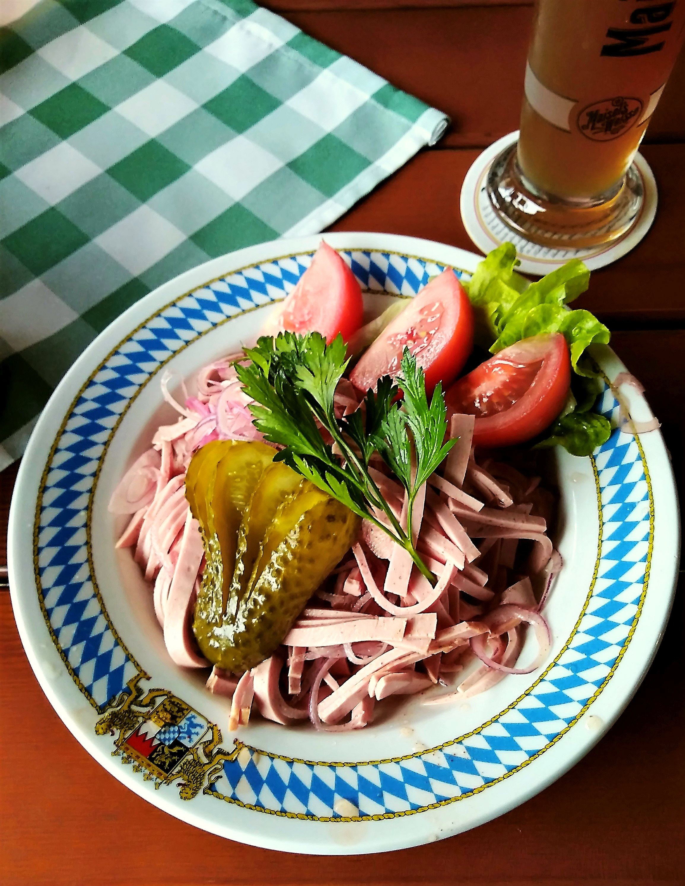 Bayrischer Wurstsalat. Fotografiert in Herzogsreut.